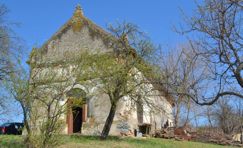 Biserica „Pogorârea Sfântului Duh”, sat Gârla Mare; comuna Gârla Mare În centrul satului 1838